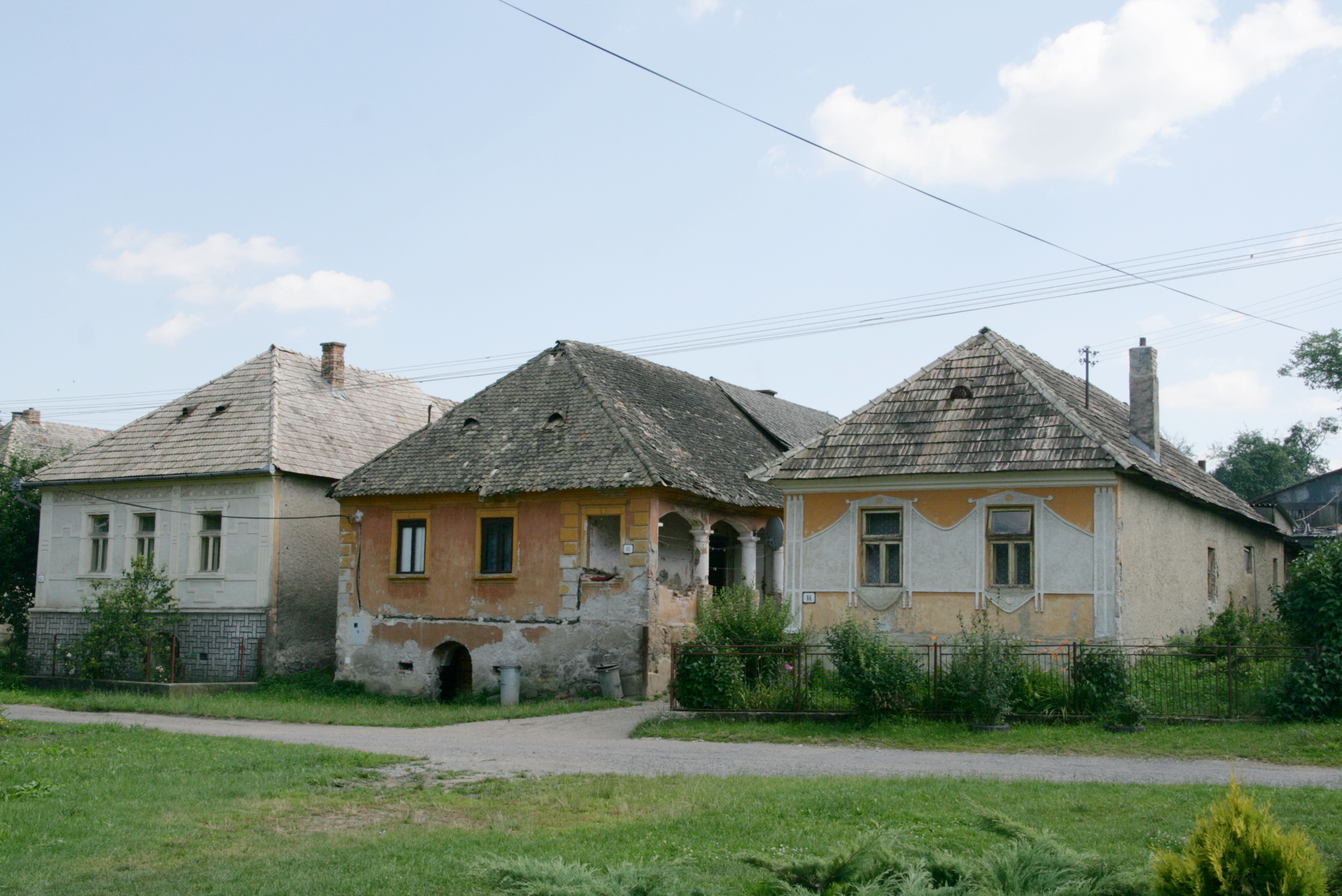 Perjése - régi házak a községben